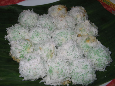 Resep Chef